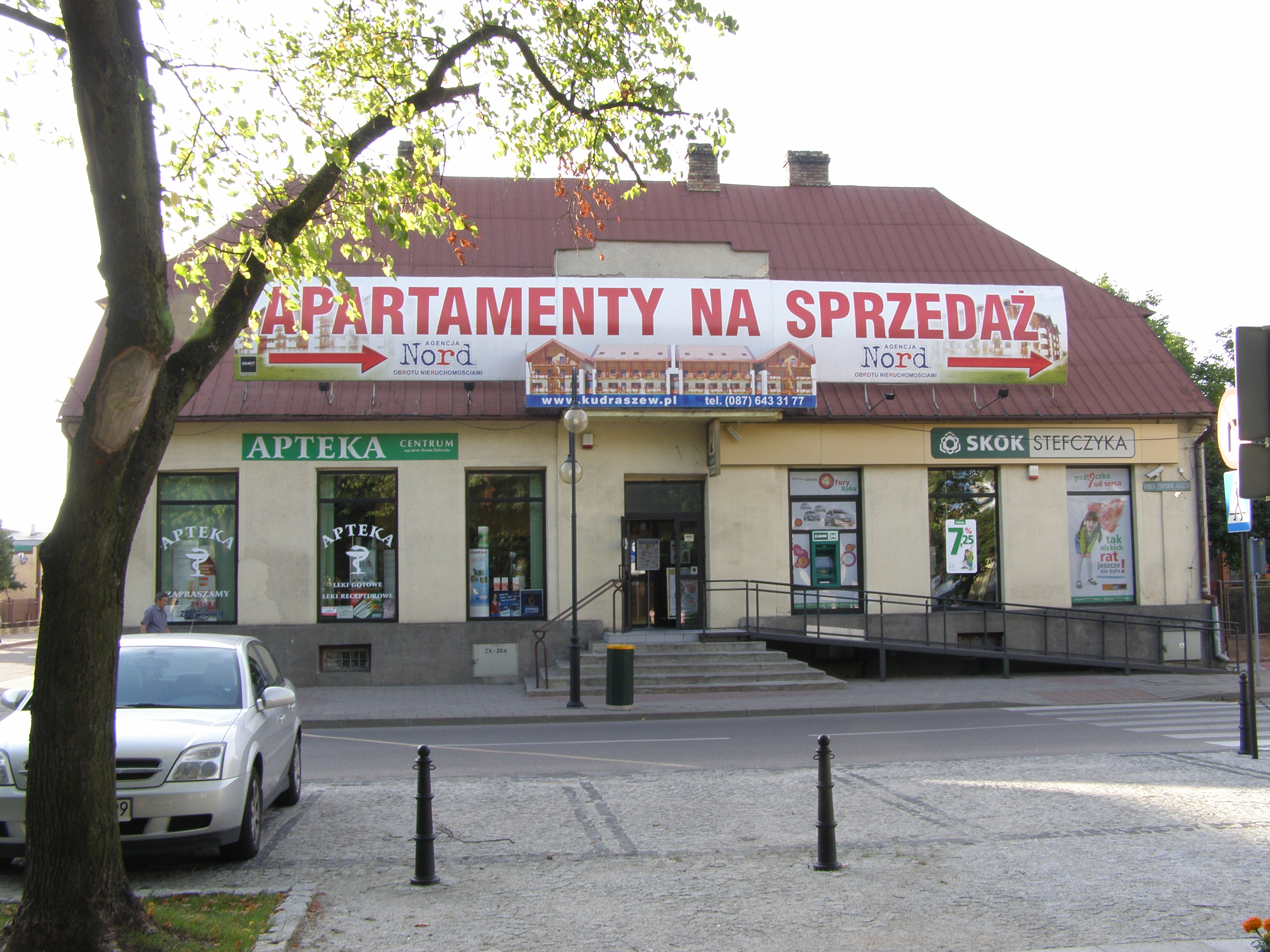 Augustów - najstarszy budynek w mieście